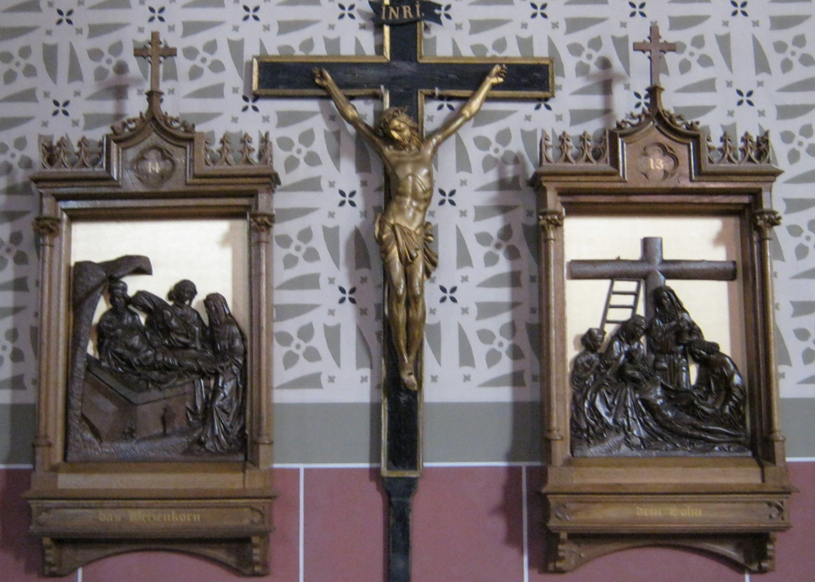 Kreuzwegstationen 14.(l.) und 13 (r.)